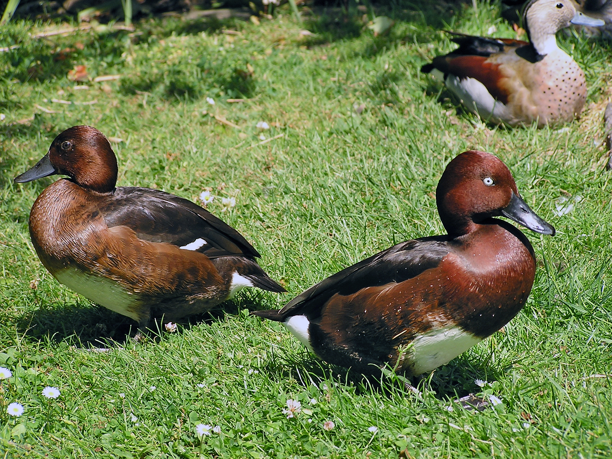 Moorente (Aythya nyroca), links ♀, rechts ♂